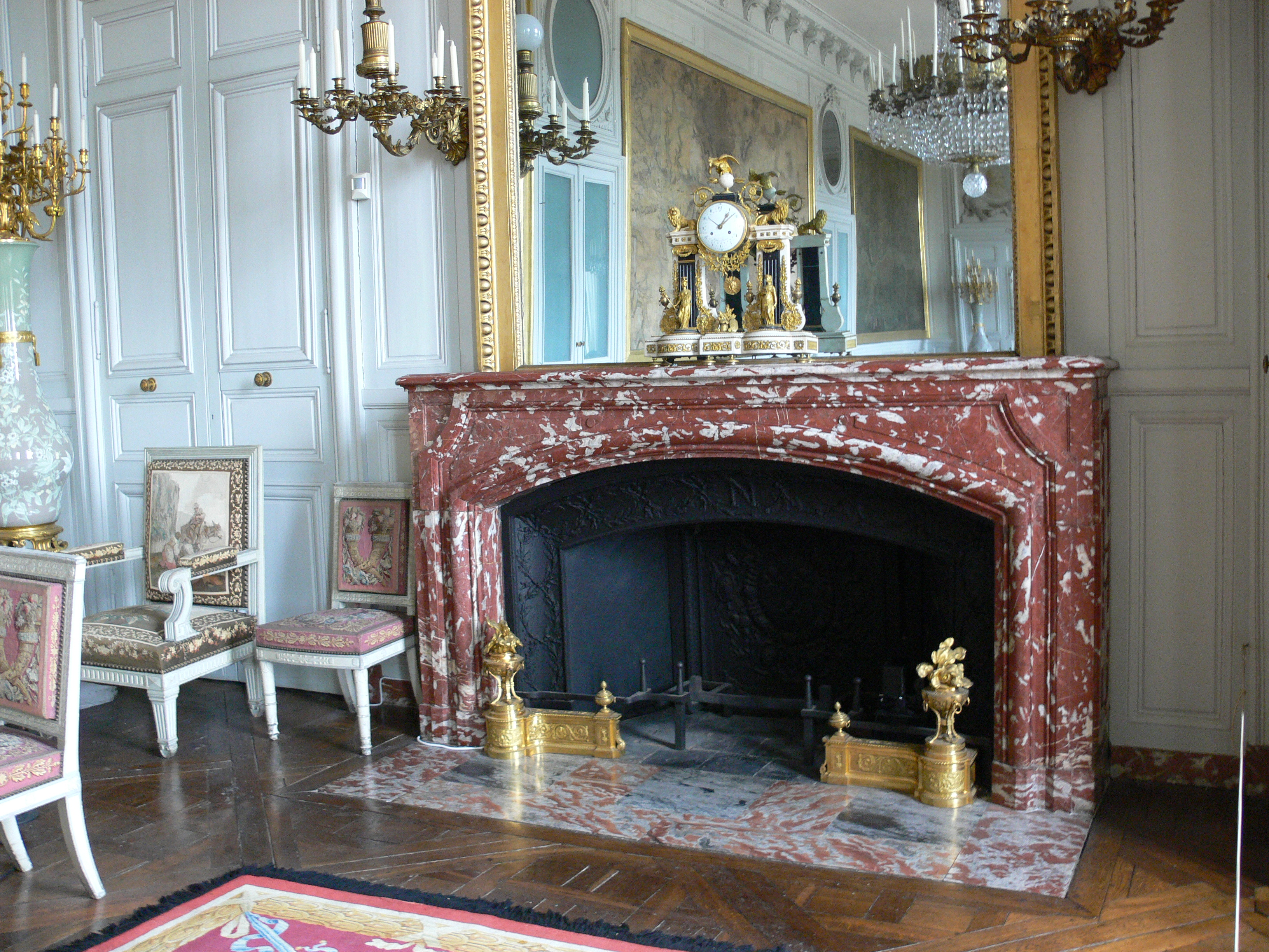 Compiègne, France: Château de Compiègne Les appartements historiques